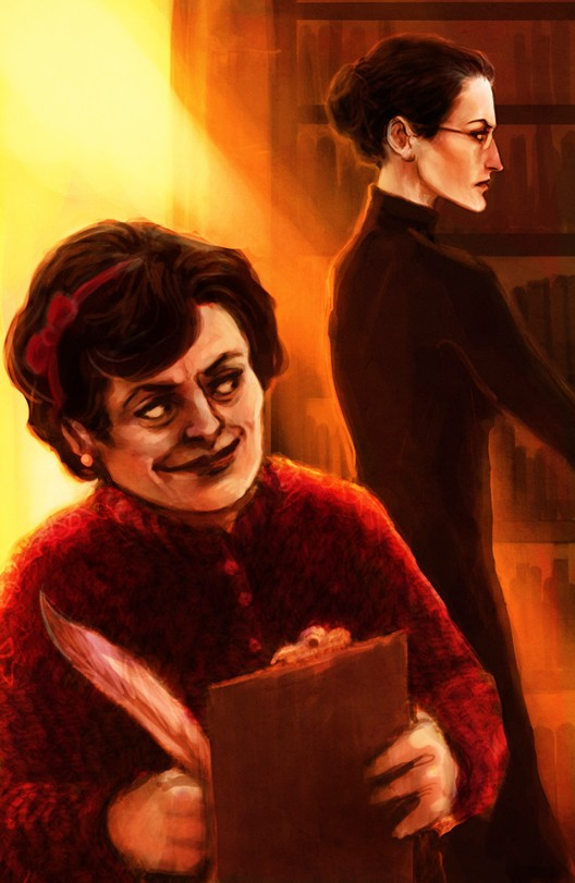 Ombrage inspectant le professeur McGonagall (Harry Potter et l'Ordre du phénix)